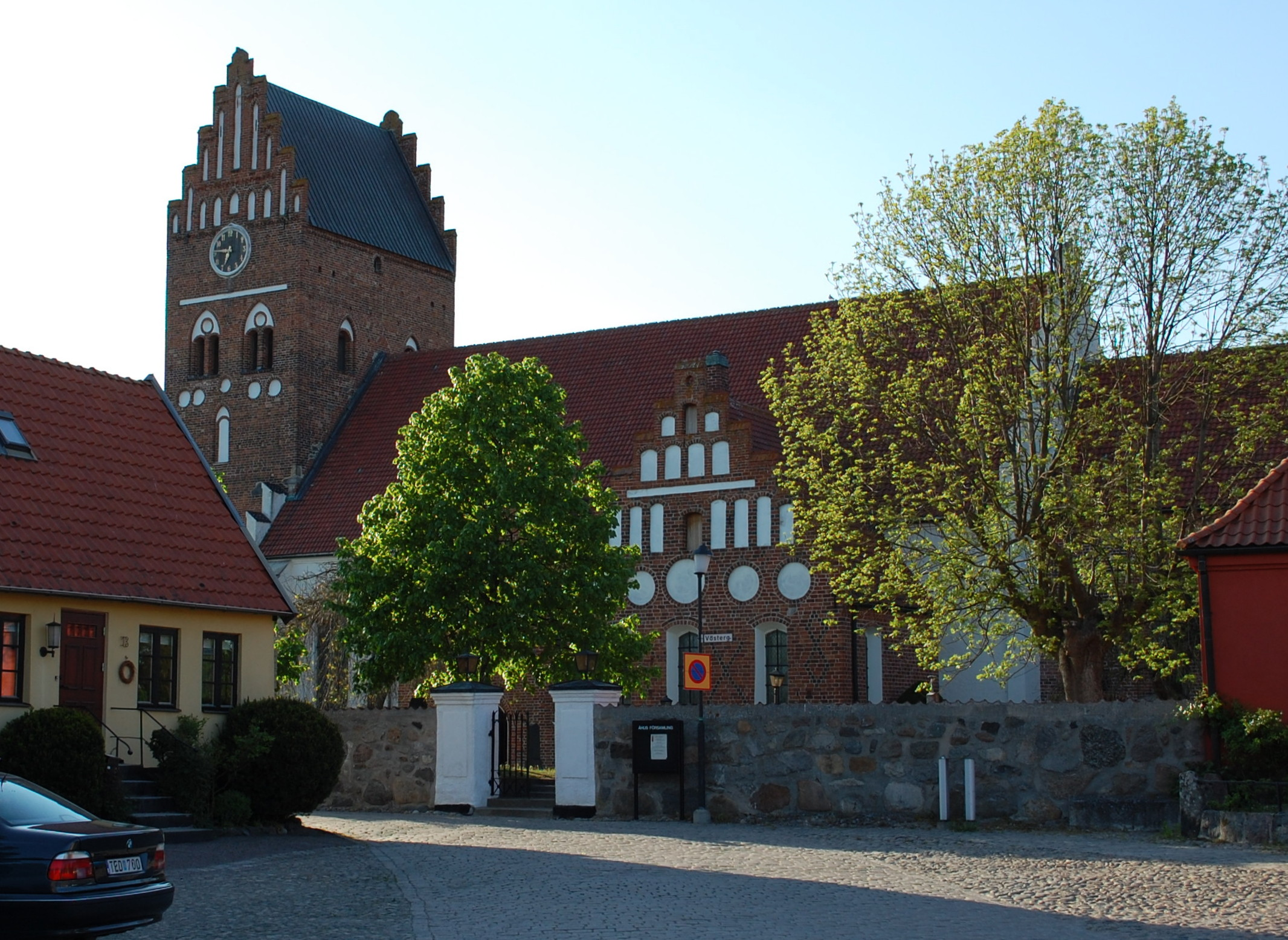 Mariakirche in Ahus